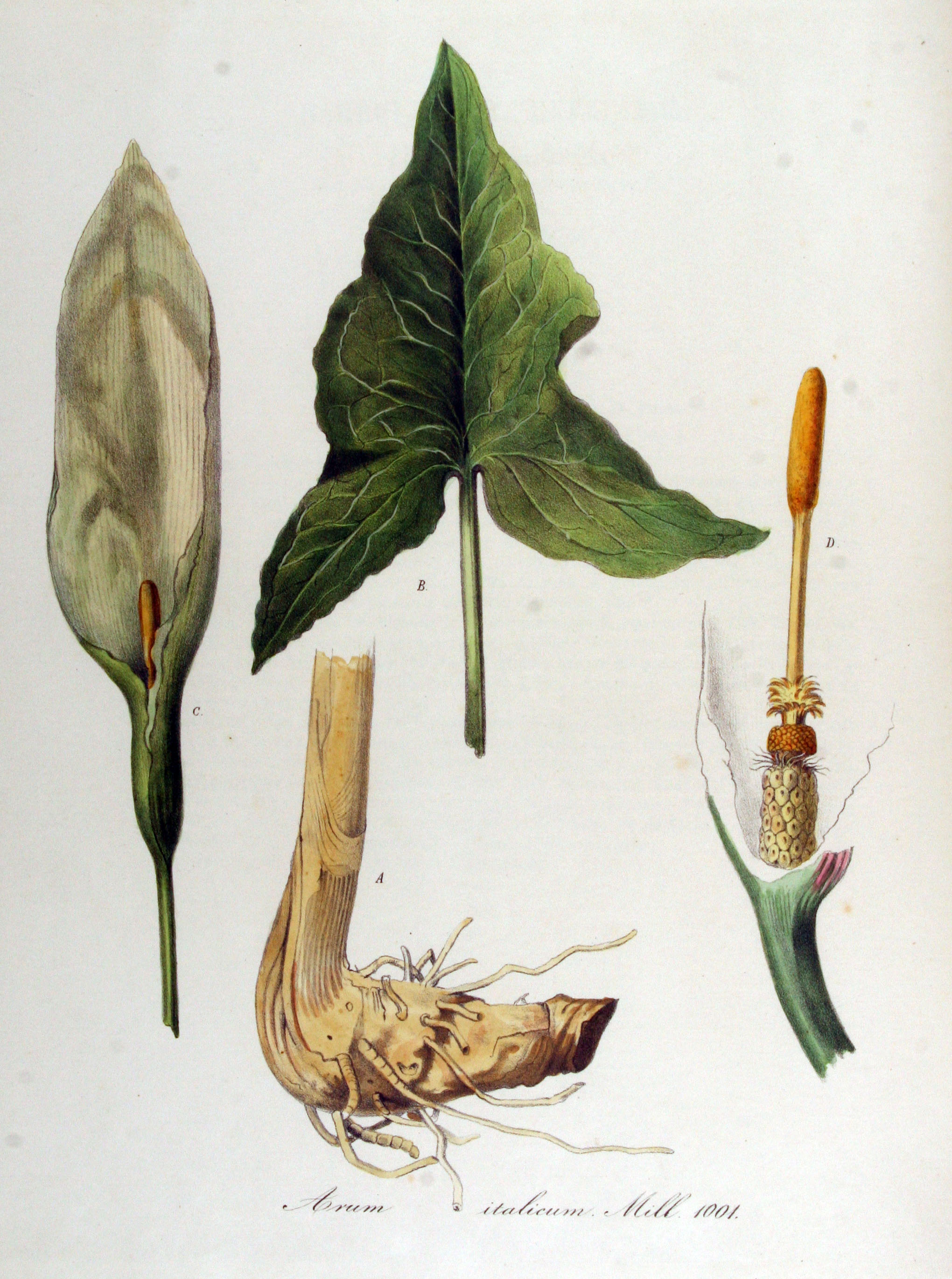 Arum italicum Mill.